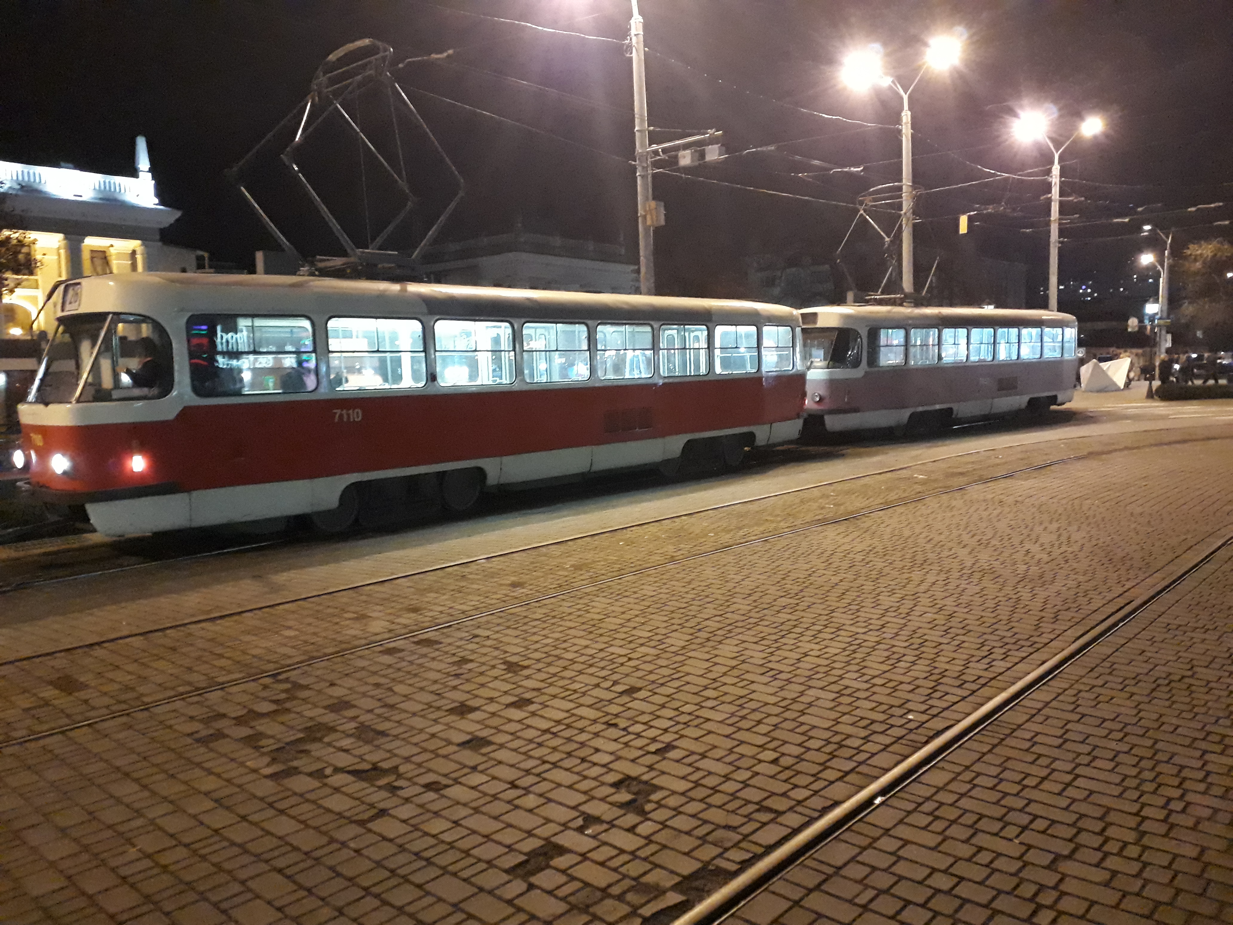 Трамвайная СМЕ из пражских вагонов Т3SUCS №7110+7057 следует после вечернего часа-пик в депо с 26-го маршрута